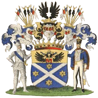 Rüdigeri suguvõsa krahvivapp